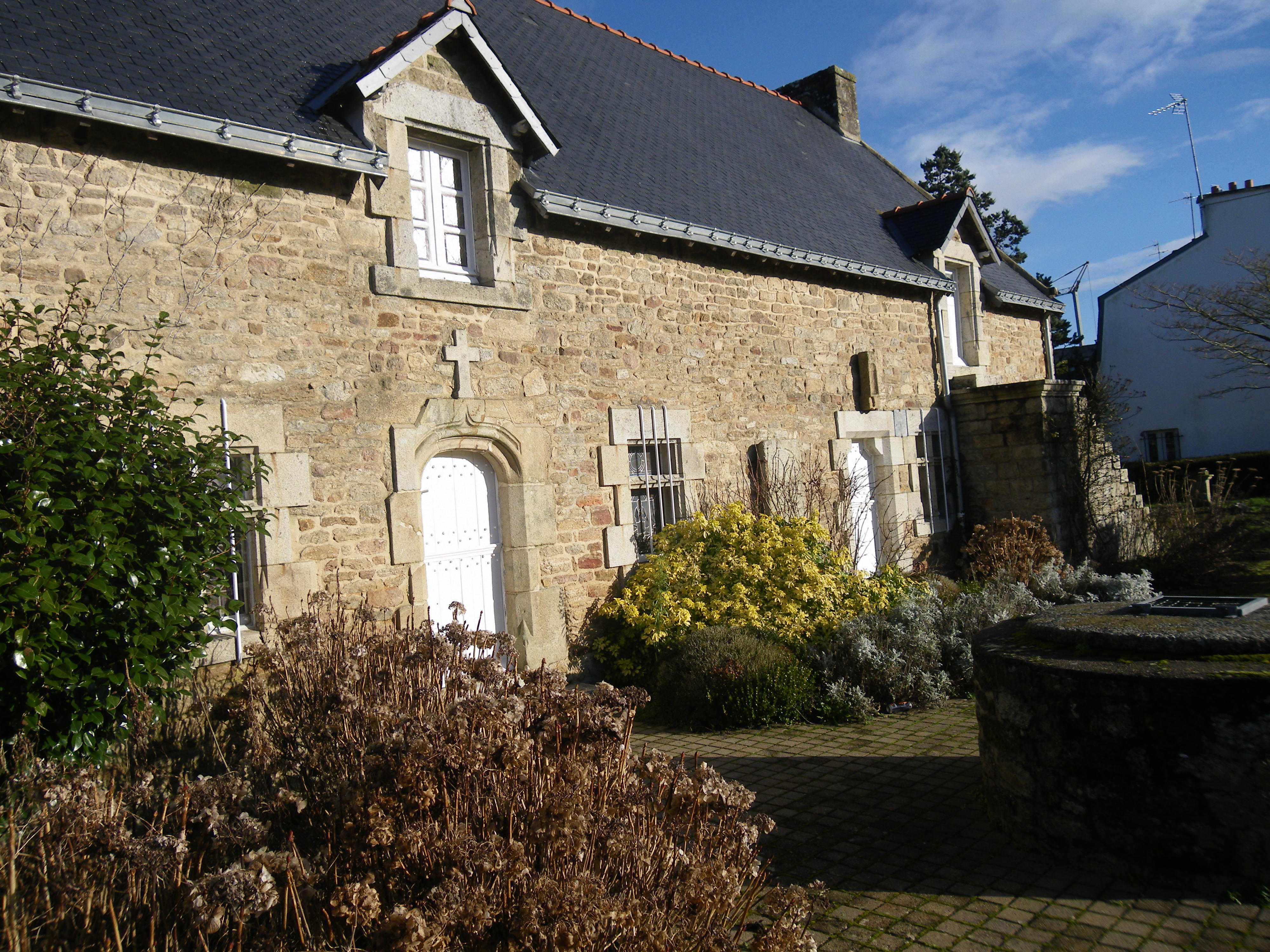 la maison de yves nicolazic a sainte anne d'auray